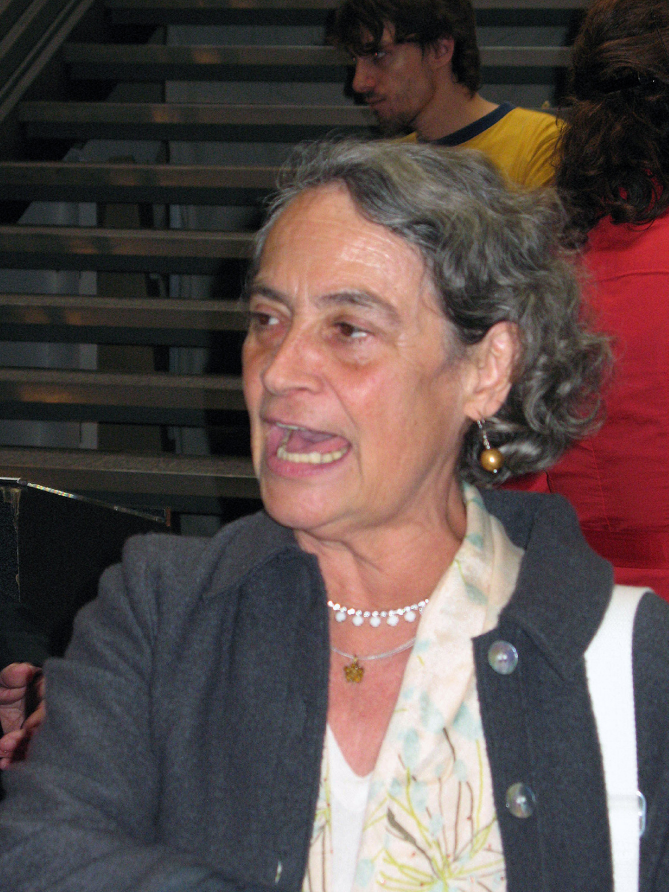 Monica Bleibtreu bei der Filmpremiere Max Minsky und ich, Berlin, 2.9.2007